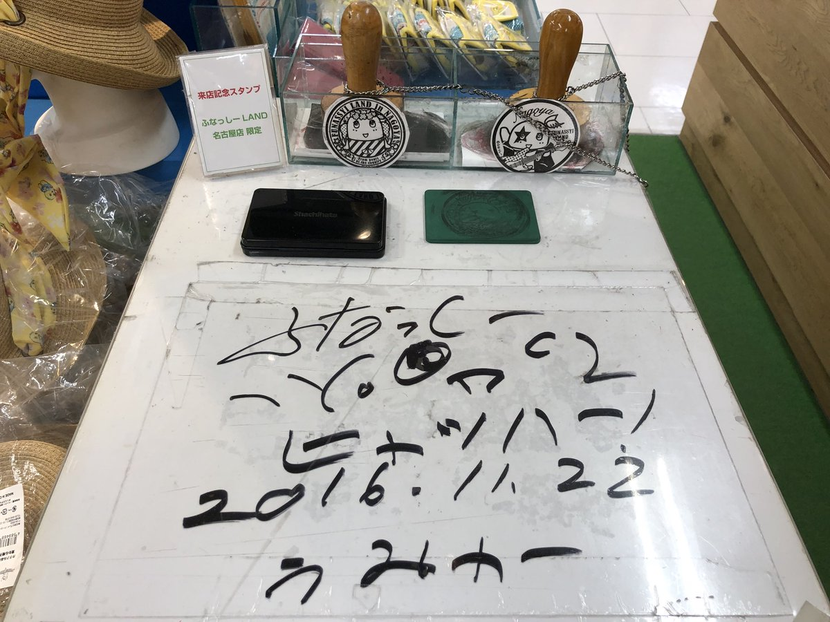 ふなっしーサイン